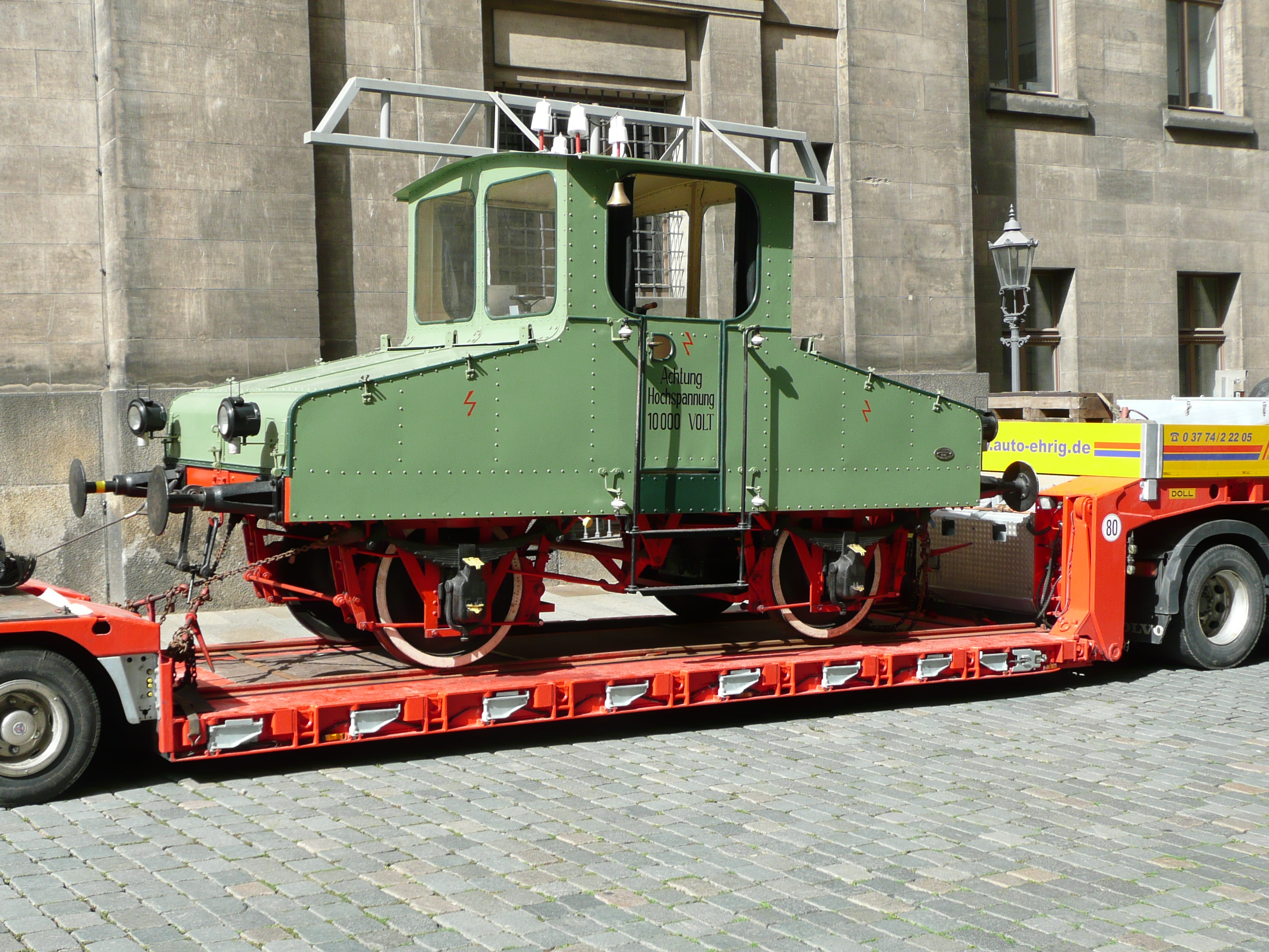 Drehstromversuchslok vor dem Verkehrsmuseum Dresden